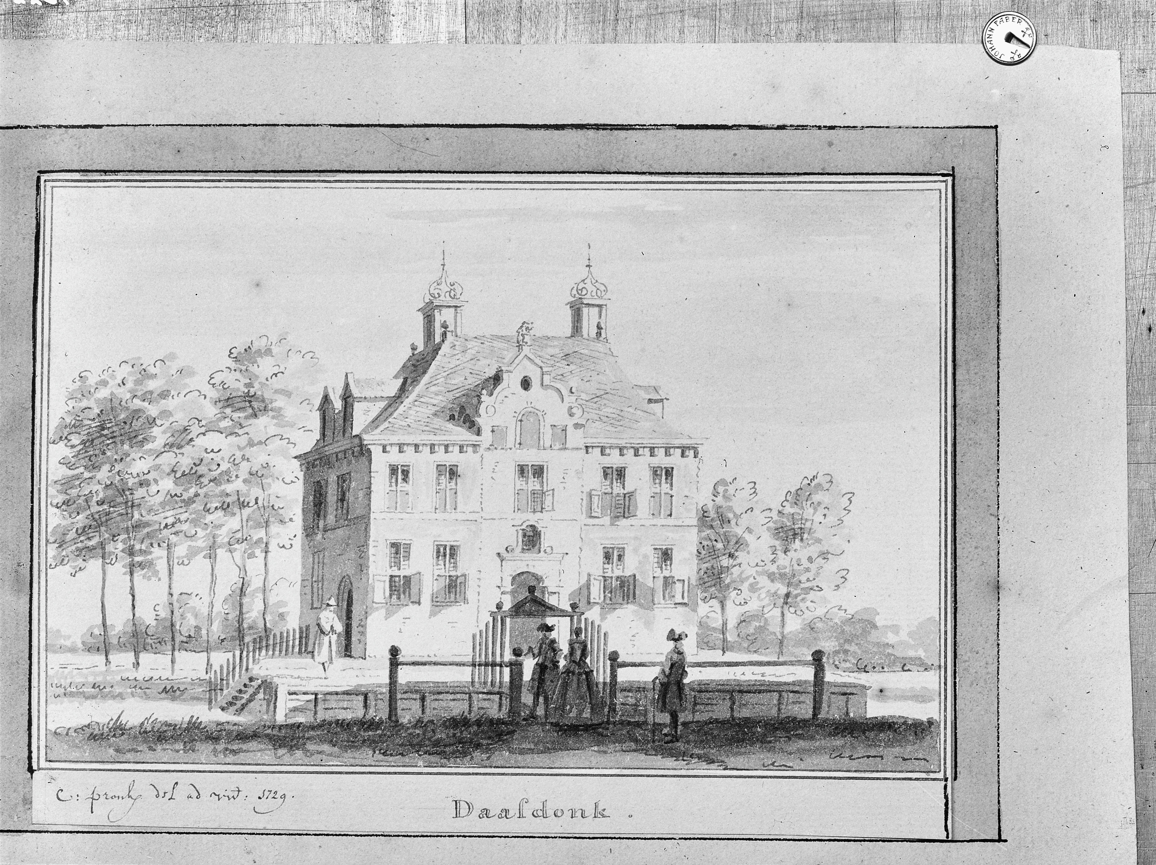 Kasteel Daasdonk: Zicht op kasteel Daasdonk van C.Pronk (opmerking: In het bezit van het archief van het Provinciaal Genootschap van Kunsten en Wetenschappen in Noord-Brabant)